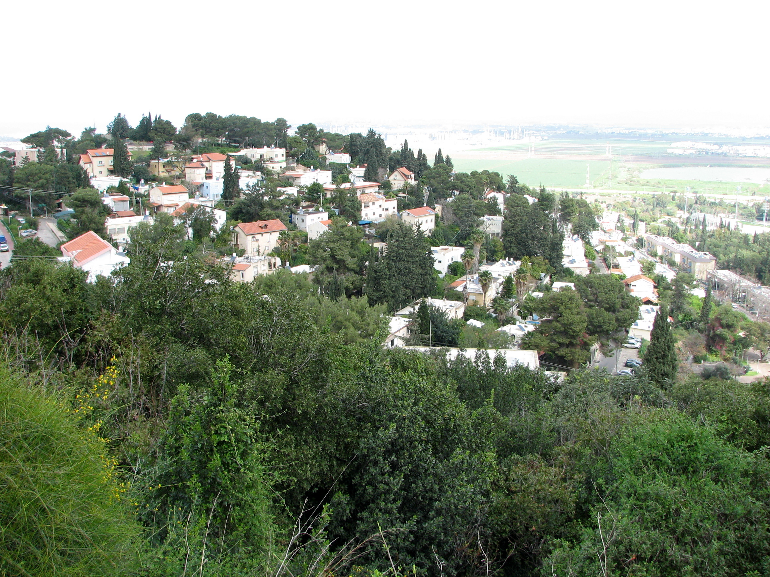 Nesher The City Nesher on Mount Carmel and Suburb:Givat Nesher תמונות משכונותיה של העיר נשר, גבעת נשר, גבעת נשר